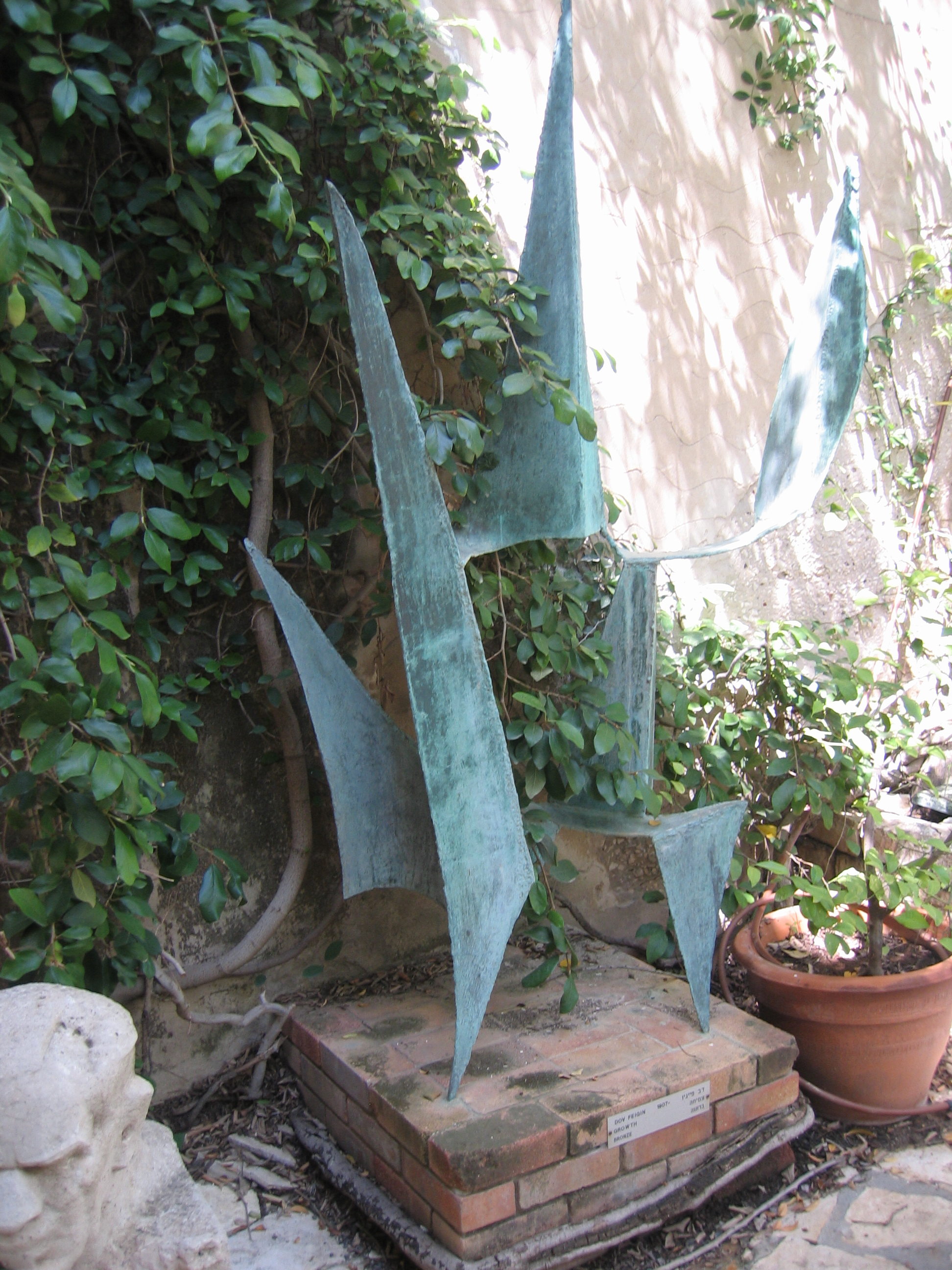 Sculpture